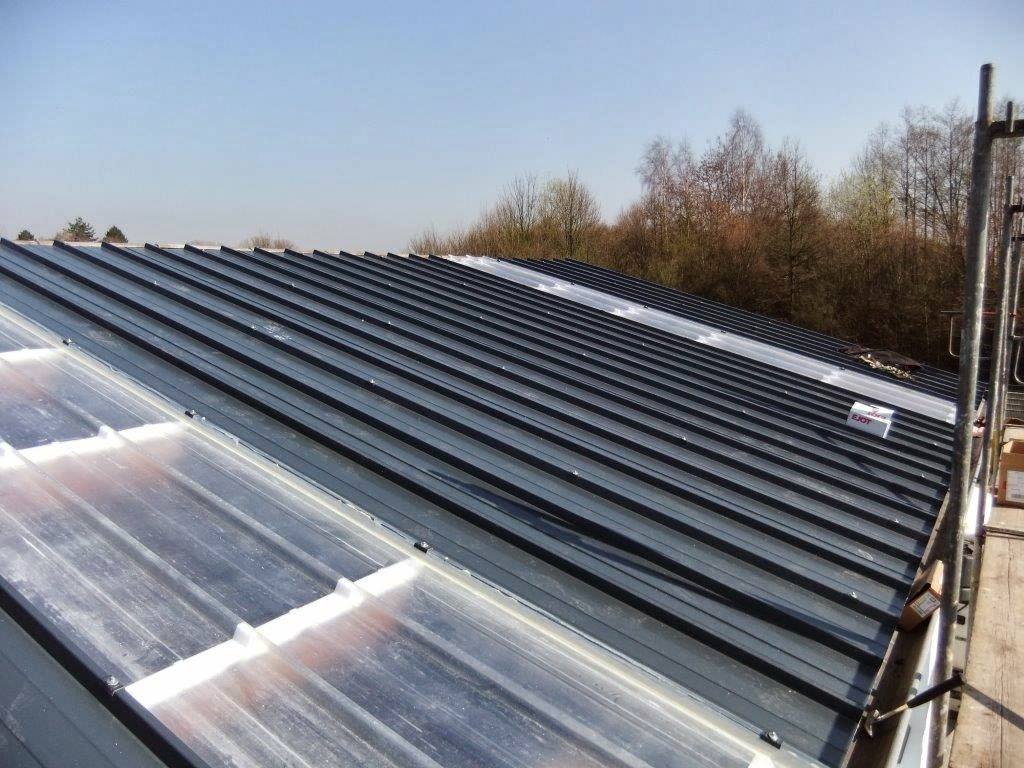 Transparentes Sandwichelement